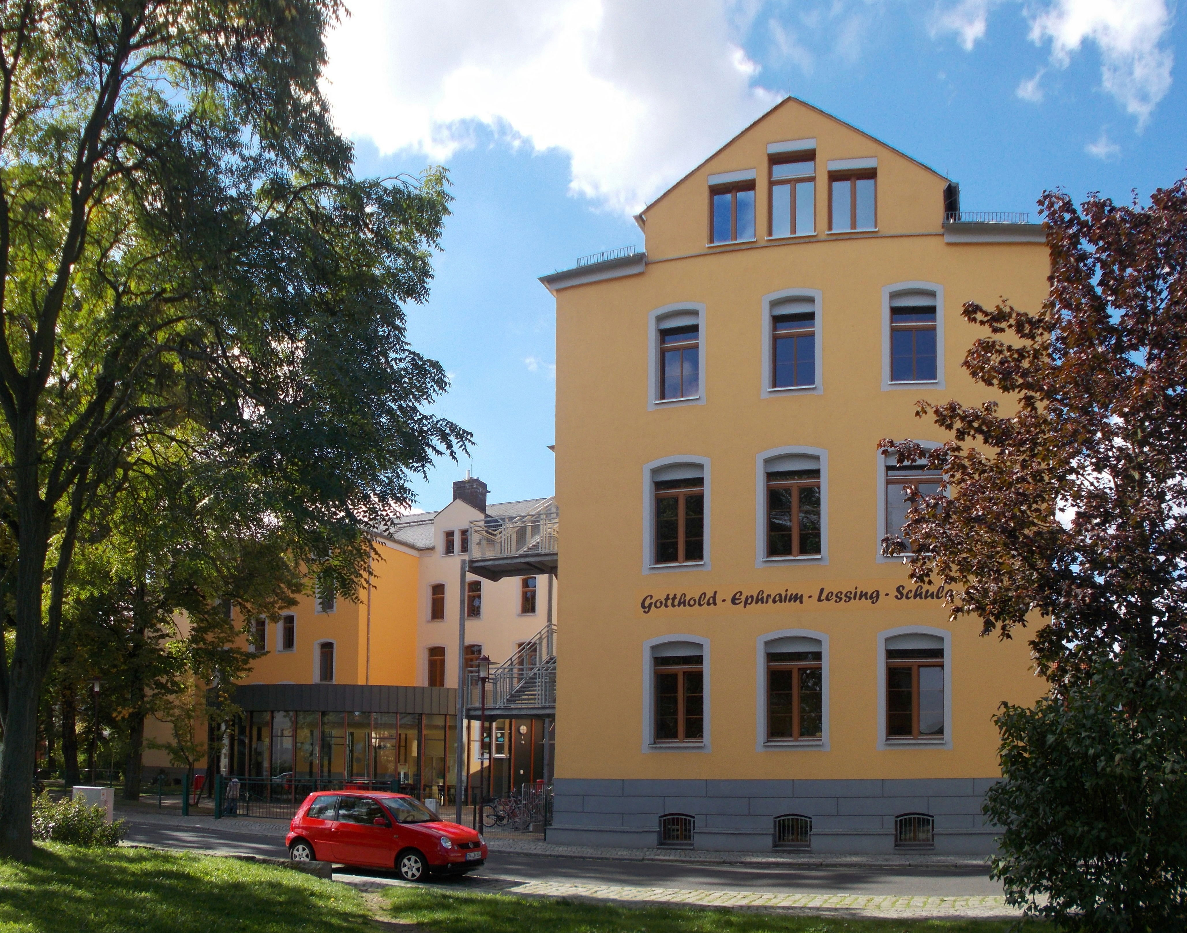 Schulen in Freital